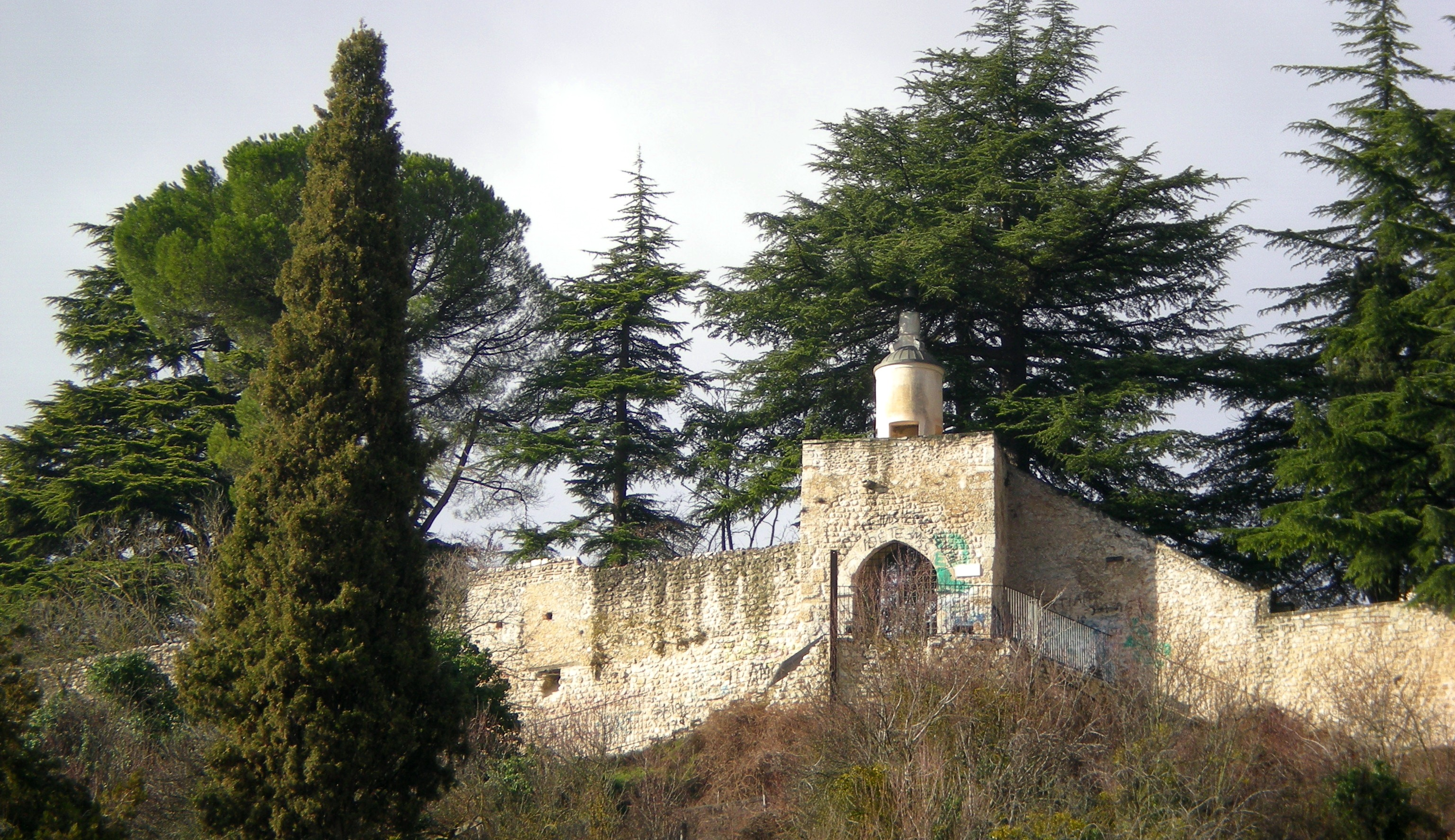 Porta Tione (L'Aquila): esterno da via Caldora